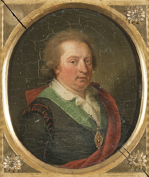 Konstnär: Ludwig Guttenbrunn, österrikisk, född mellan 1750 och 1755, född ca 1750 eller ca 1755, död 1819-01-15 Avbildad person: Johan Tobias Sergel, svensk, Född 1740-08-28, Död 1814-02-26 Målad i Florens, Italien Tillhör Nationalmuseum, med inventarienummer: NMGrh 4697 Inköp 2009 med donationsmedel från Sara och Johan Emil Graumanns stiftelse